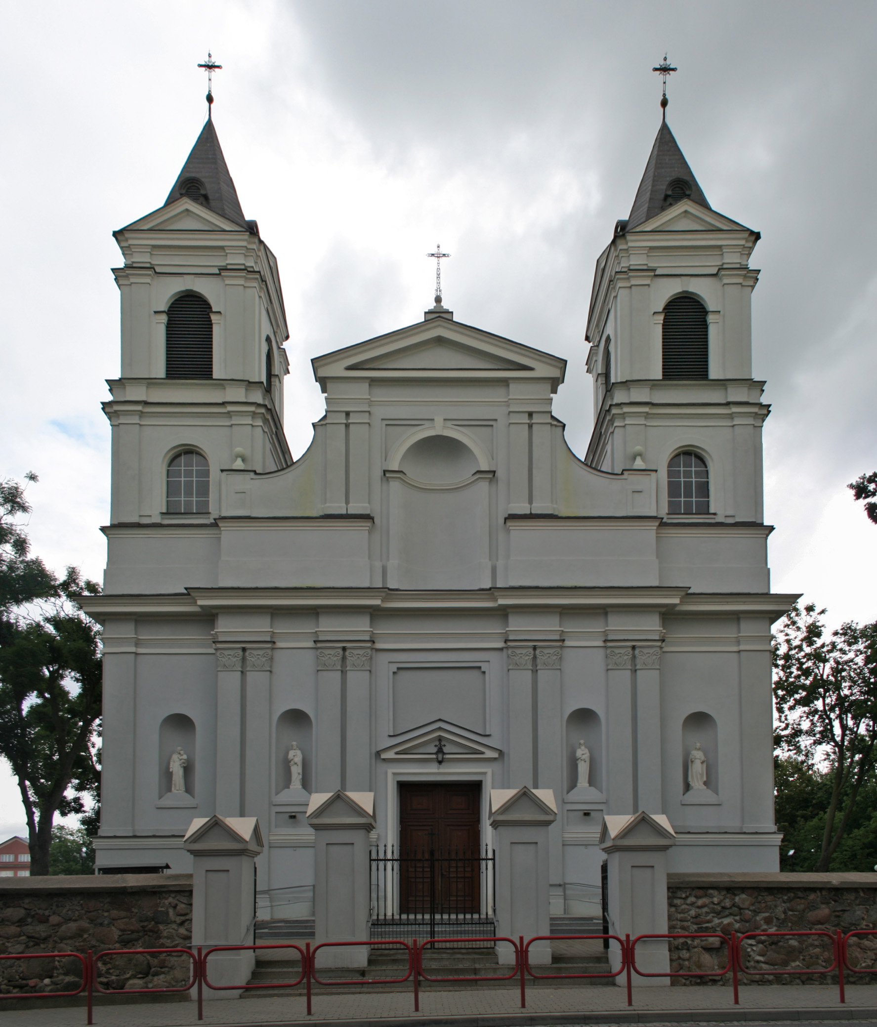 Kościół św. Pawła i Piotra w Suchowoli.